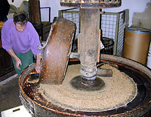 Ölmühle Eberhardt in Badenweiler Kamera: Nikon Coolpix 950 Software: GIMP